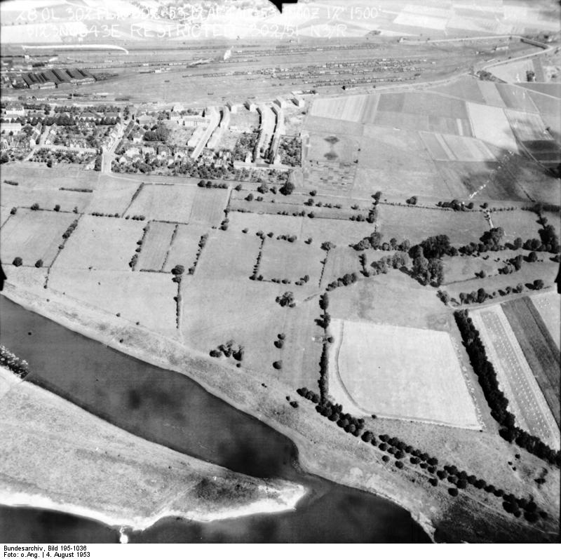 Rheinbefliegung der Alliierten 1953